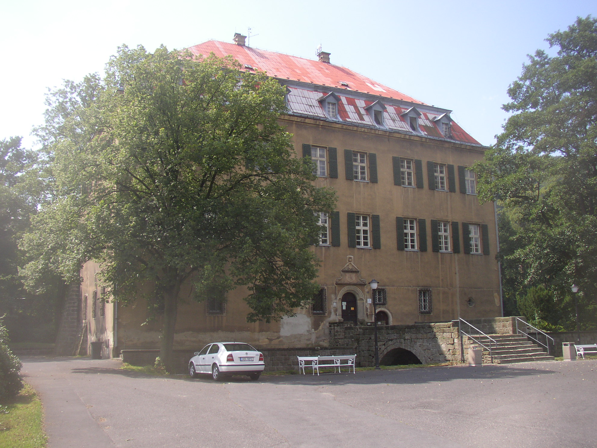 Zámek v Jílovém, okres Děčín.